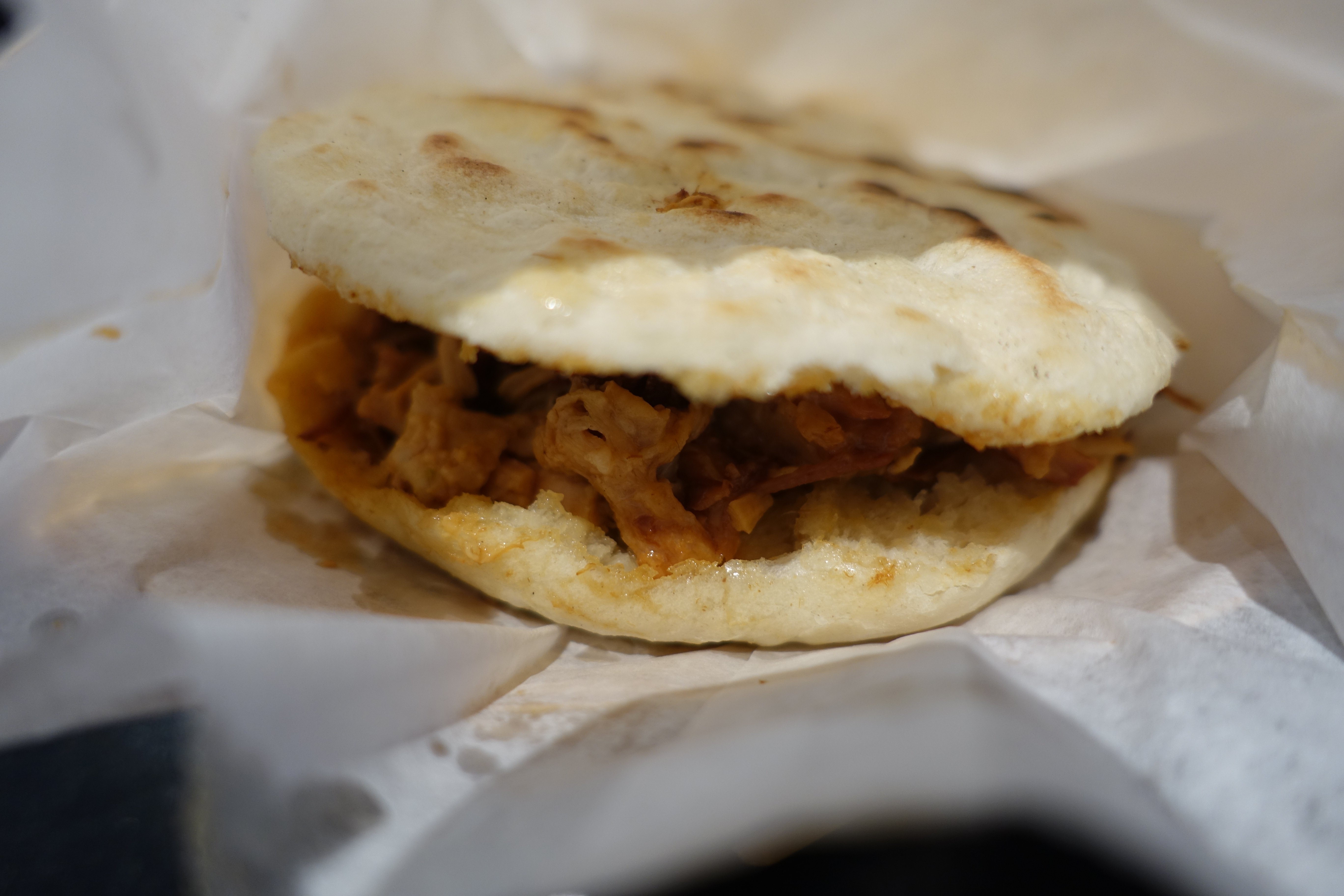 Roujiamo @ La Taverne de Zhao @ Paris